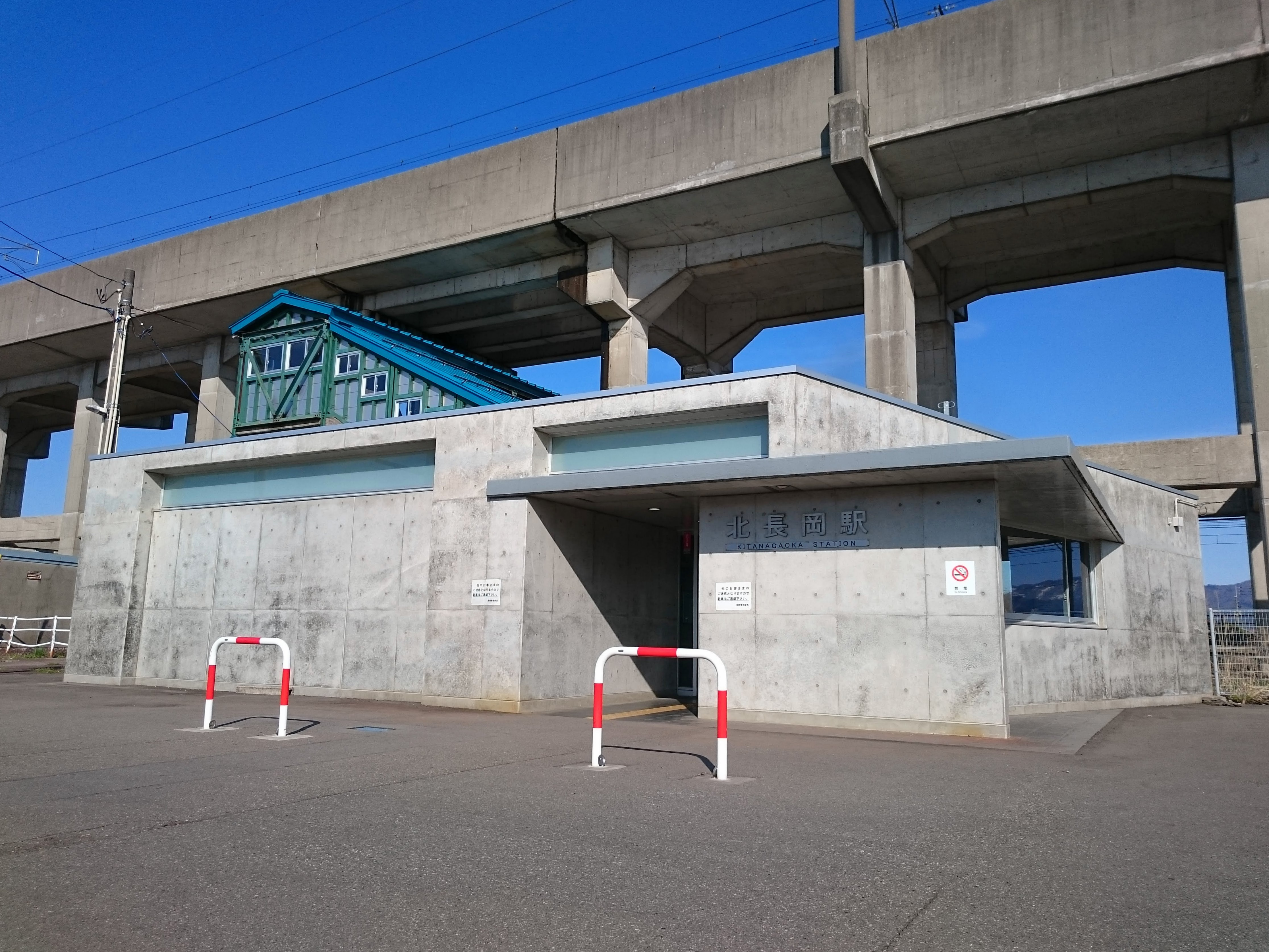 北長岡駅の駅舎外観